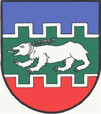 Wappen der Gemeinde Schäffern